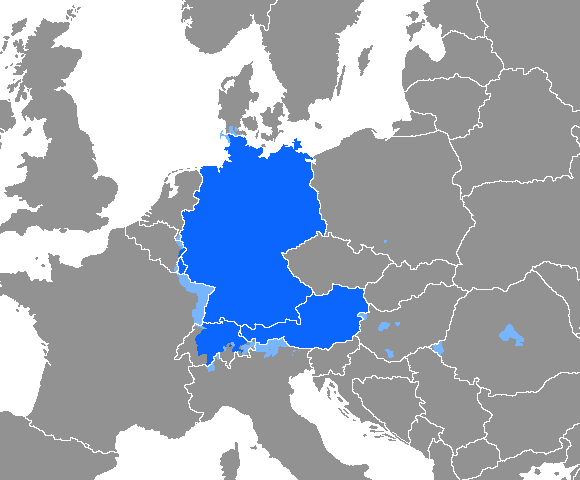 Idioma alemán en Europa